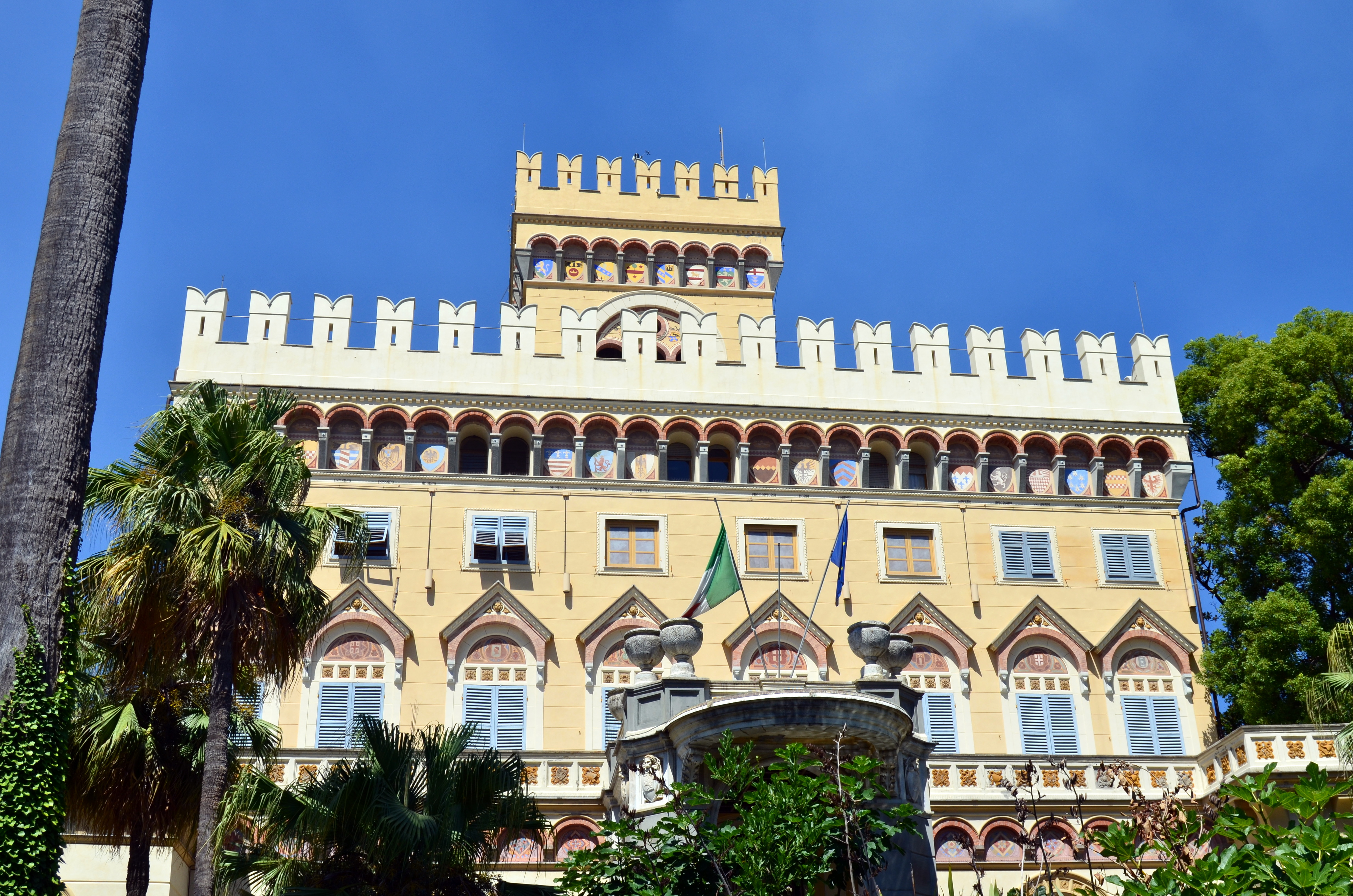 Villa Negrotto Cambiaso, parco comunale di Villa Negrotto Cambiaso, Arenzano, Liguria, Italia